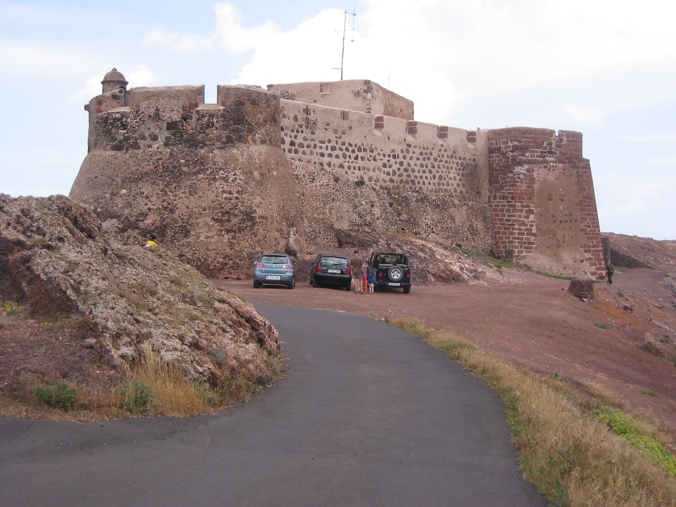 Castillo de Santa Bárbara (Lanzarote, Spain)